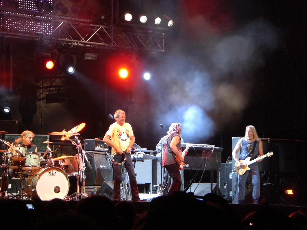 13/09/2008 - Concierto de Deep Purple y Rockzilla